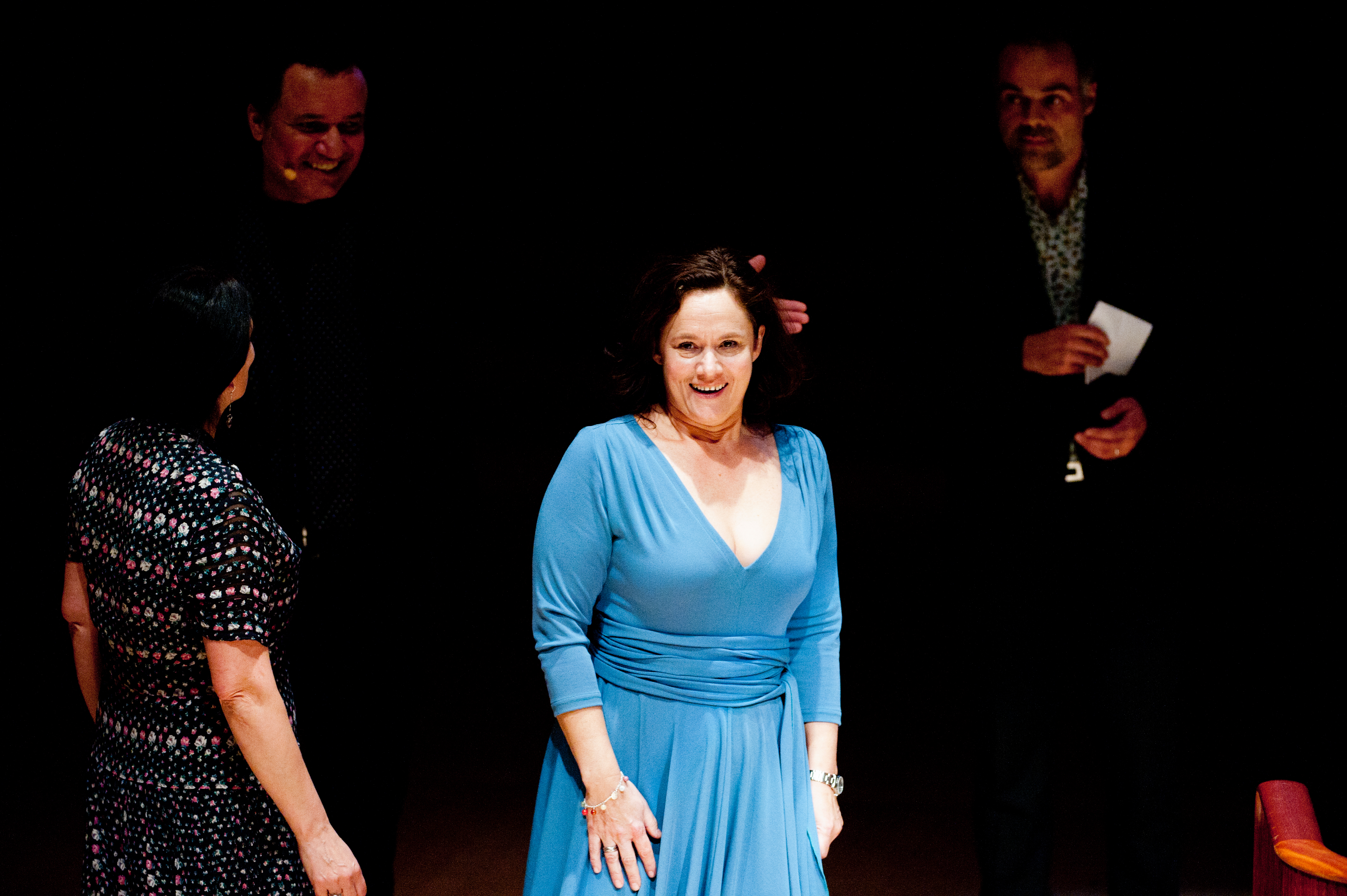 Pernilla August, vinnare av Nordiska rådets filmpris 2011.